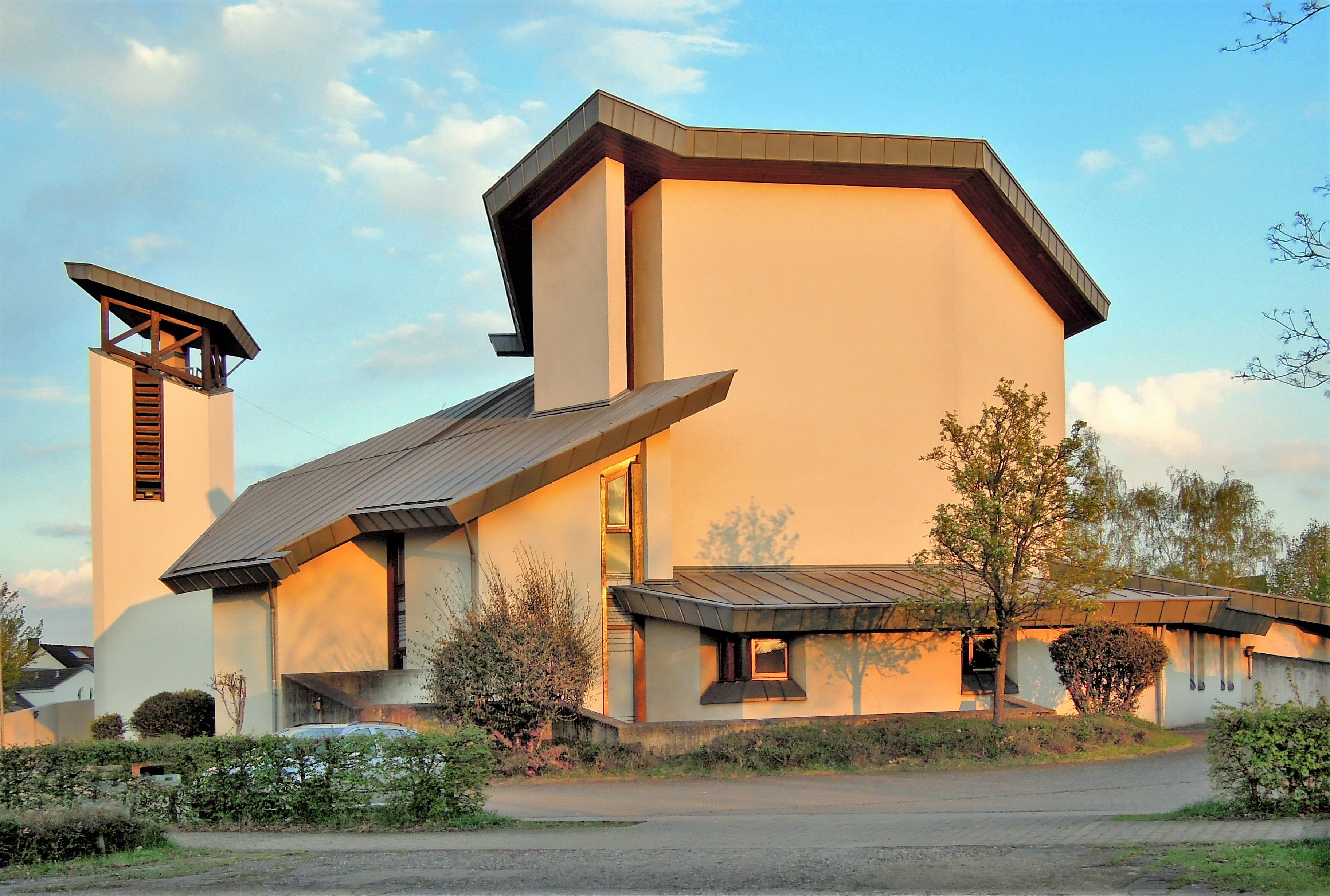 Sankt Johann